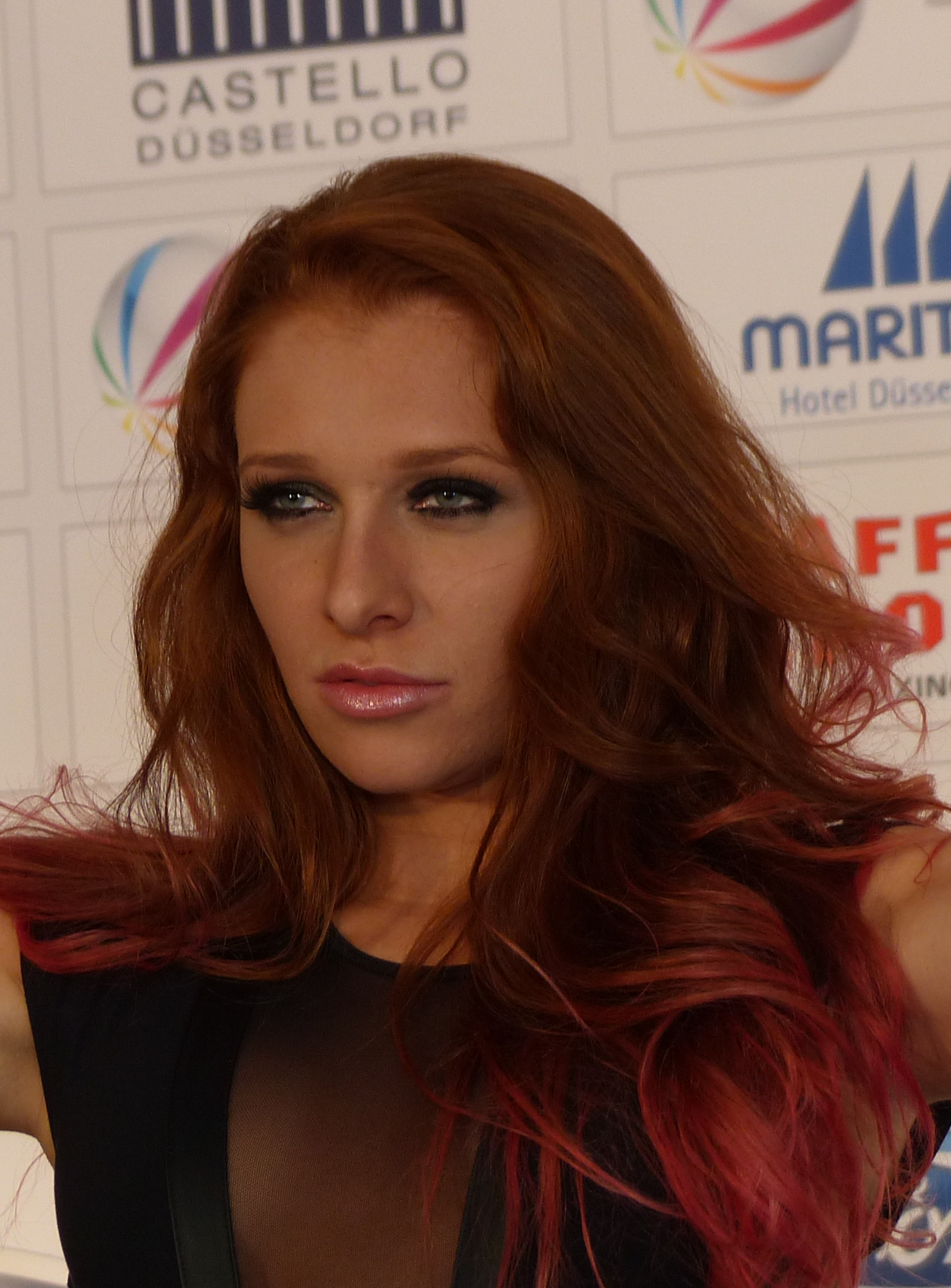 Georgina Fleur/Bülowius beim offiziellen Wiegen fürs Promiboxen 2013